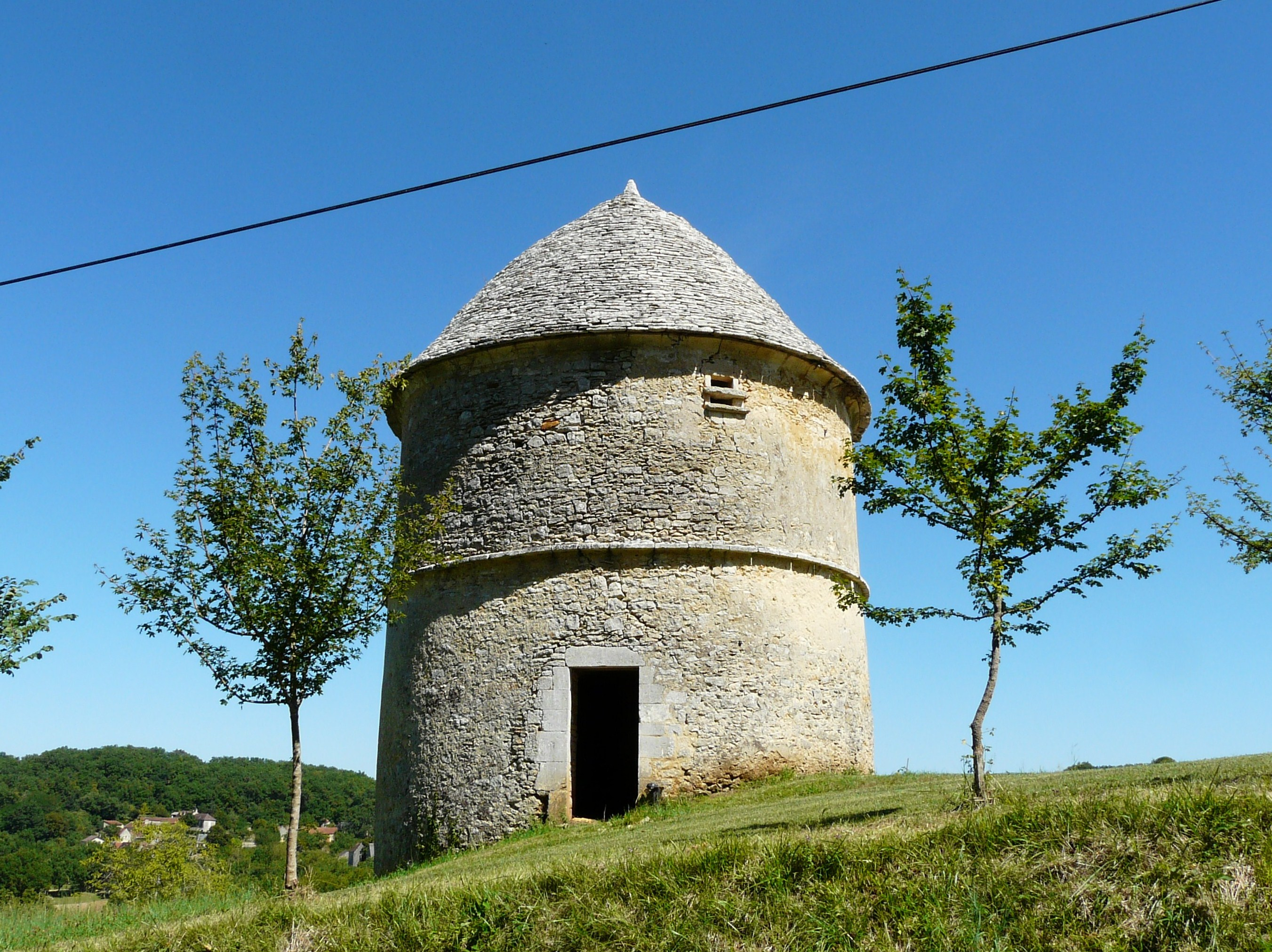 Le pigeonnier du Château, La Cassagne, Dordogne, France